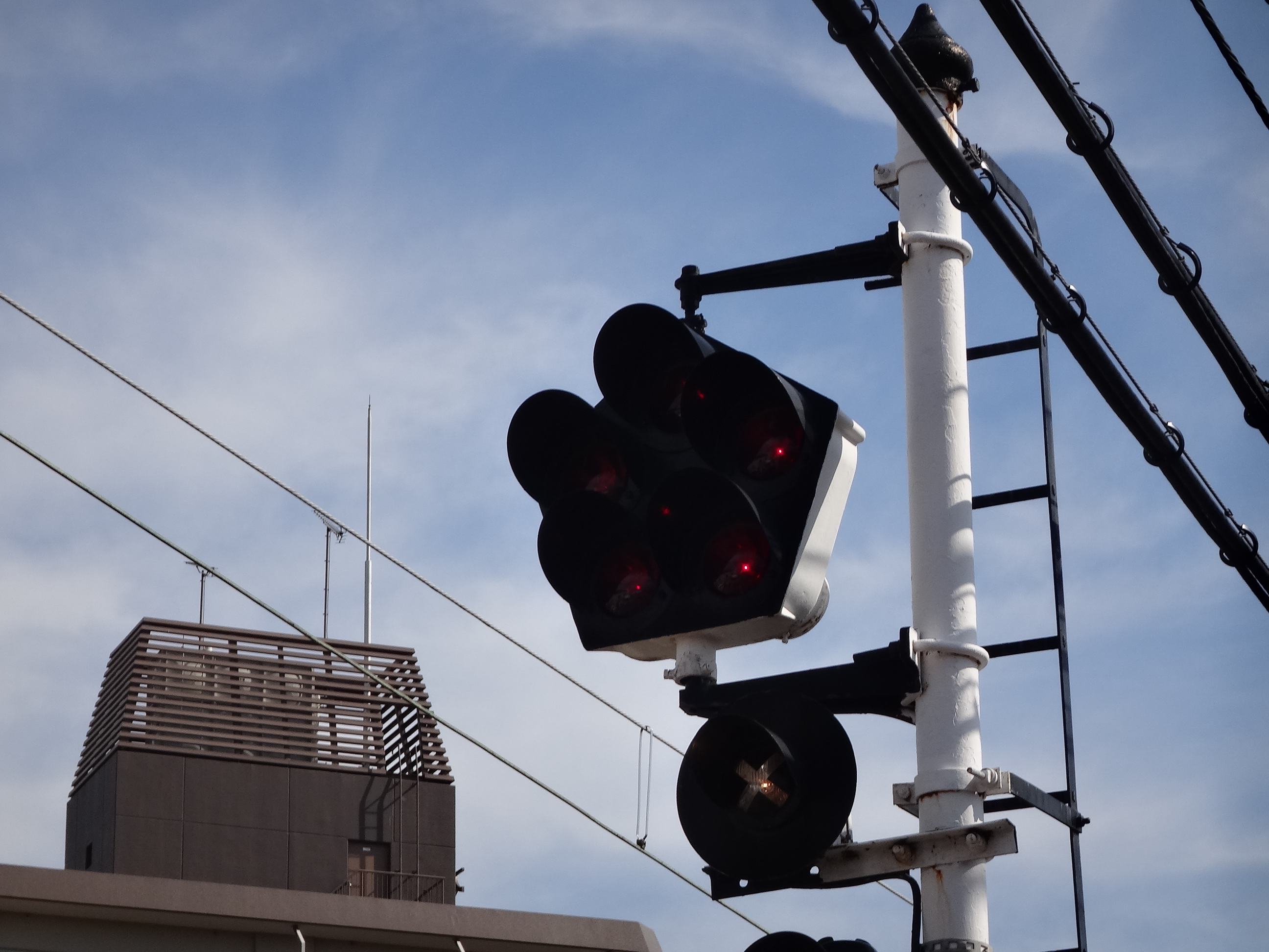 山陽電鉄で採用している特殊信号発光機と踏切動作確認灯（イベントによる動作デモンストレーション）